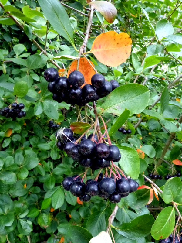 Aronia melanocarpa cv. Rubina, at Ökologisch-Botanischer Garten Bayreuth